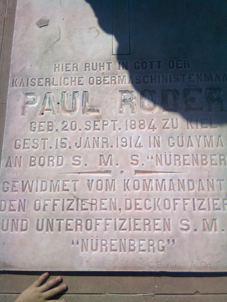 Aqui descanza bajo el Dios Imperial Maquinista Superior Paul Roder nacido el 20 de Septiembre de 1884 murio en la quilla el 15 de Enero de 1914 en Guaymas a bordo del S.M.S. Nuremberg Dedicado por el Comandante, oficiales,suboficiales y personal y del S.M.S. Nuremberg. (Este navio combatio en la Primera Guerra Mundial y fue hundido el 8 de Diciembre de 1914 en la batalla de las Islas Falkland, estaba al mando de "Maximilian von Spee")